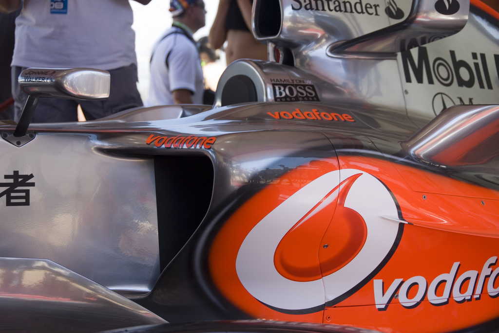 McLaren side pod